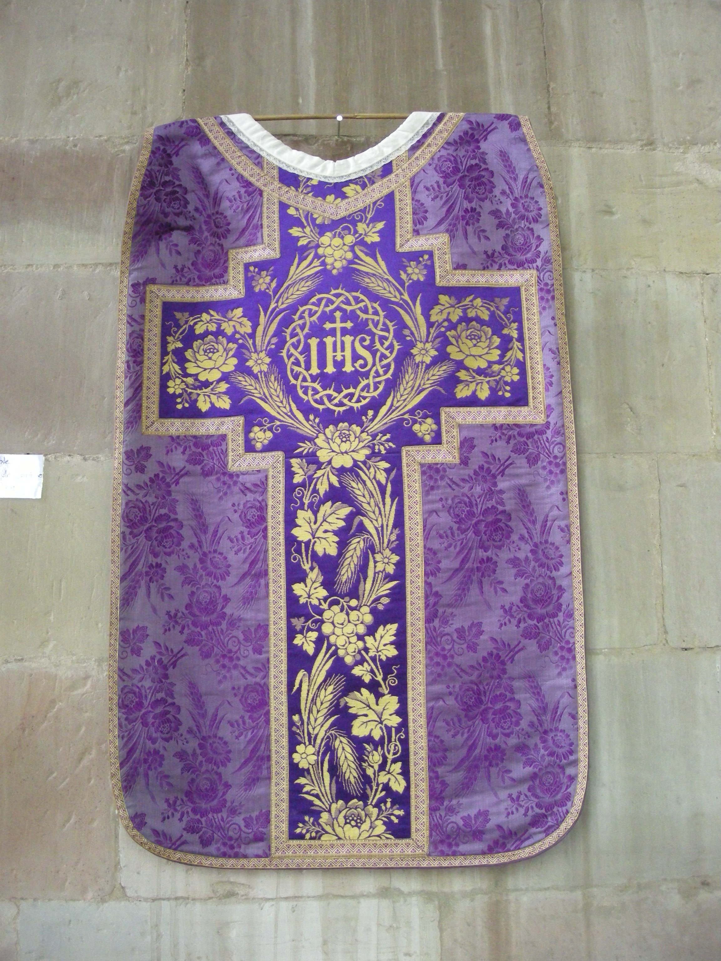 Chasuble pour les Temps de Carême et de l'Avent, présentée dans le cadre d'une exposition temporaire à l'abbaye Notre-Dame d'Autrey (Vosges) en 2008.